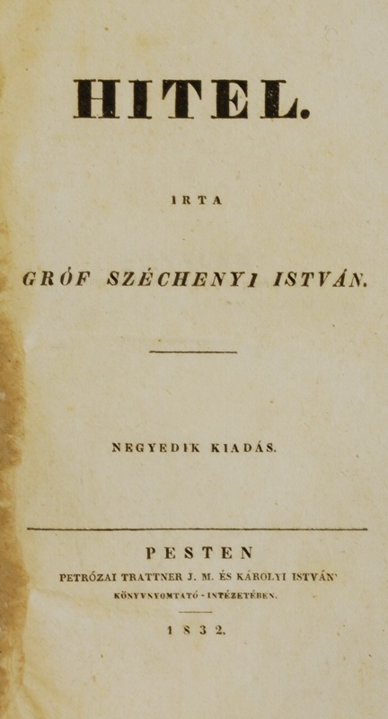 Széchenyi István Hitel című művének (Pest, 1832) címlapja